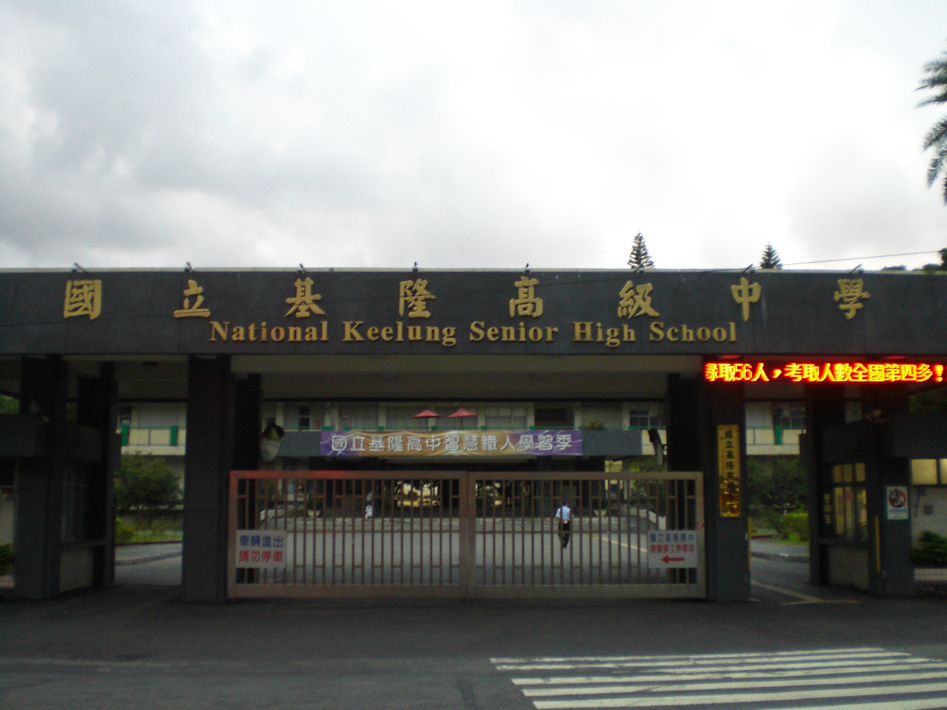 中文（台灣）: 國立基隆高級中學大門。